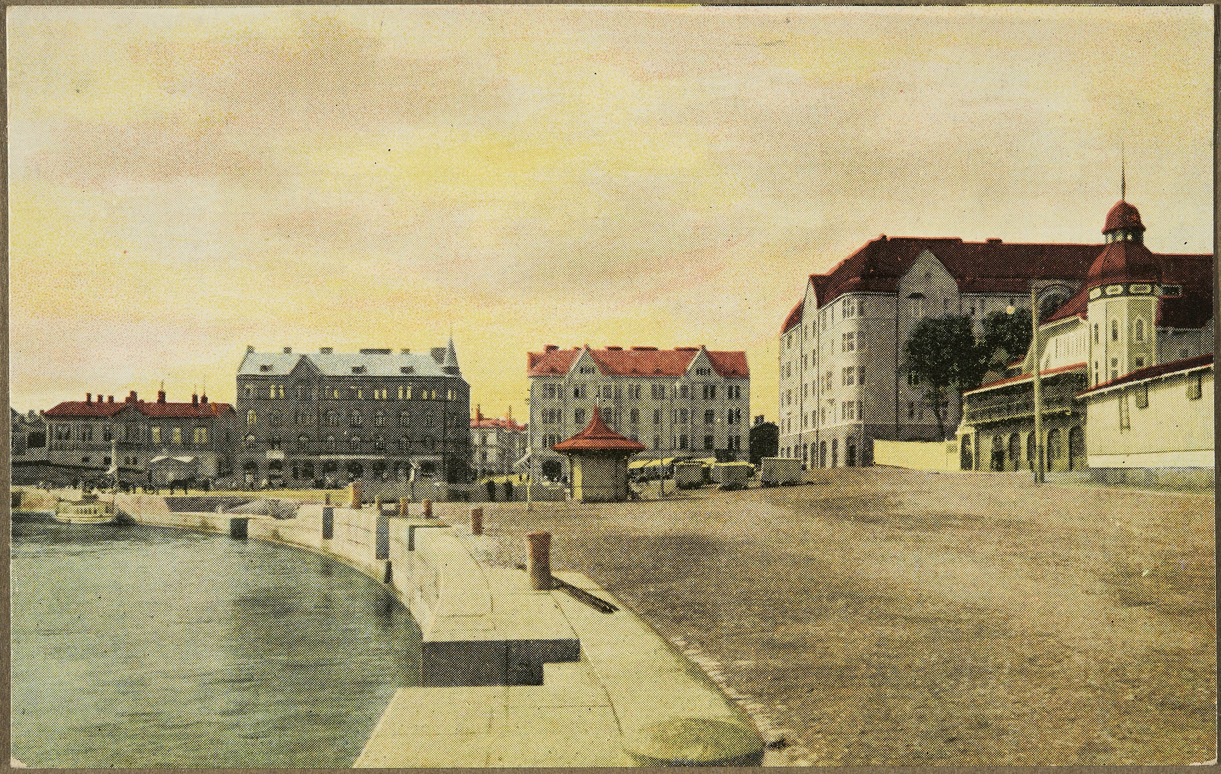 Kuvassa on näkymä Laukontorin satamasta Tampereelta. Torin laidalla kohoaa kolme asuinkerrostaloa: vasemmalla on vaaleakattoinen Laukonkulma (Arthur af Hällström 1901), keskellä punakattoinen Laukonhelmi eli Nykäsen talo (Vihtori Heikkilä 1904) ja oikealla tummakattoinen Laukonlinna (Birger Federley 1907). Kuvan oikeassa laidassa näkyy Kauppaseuran talo (August Krook 1905).